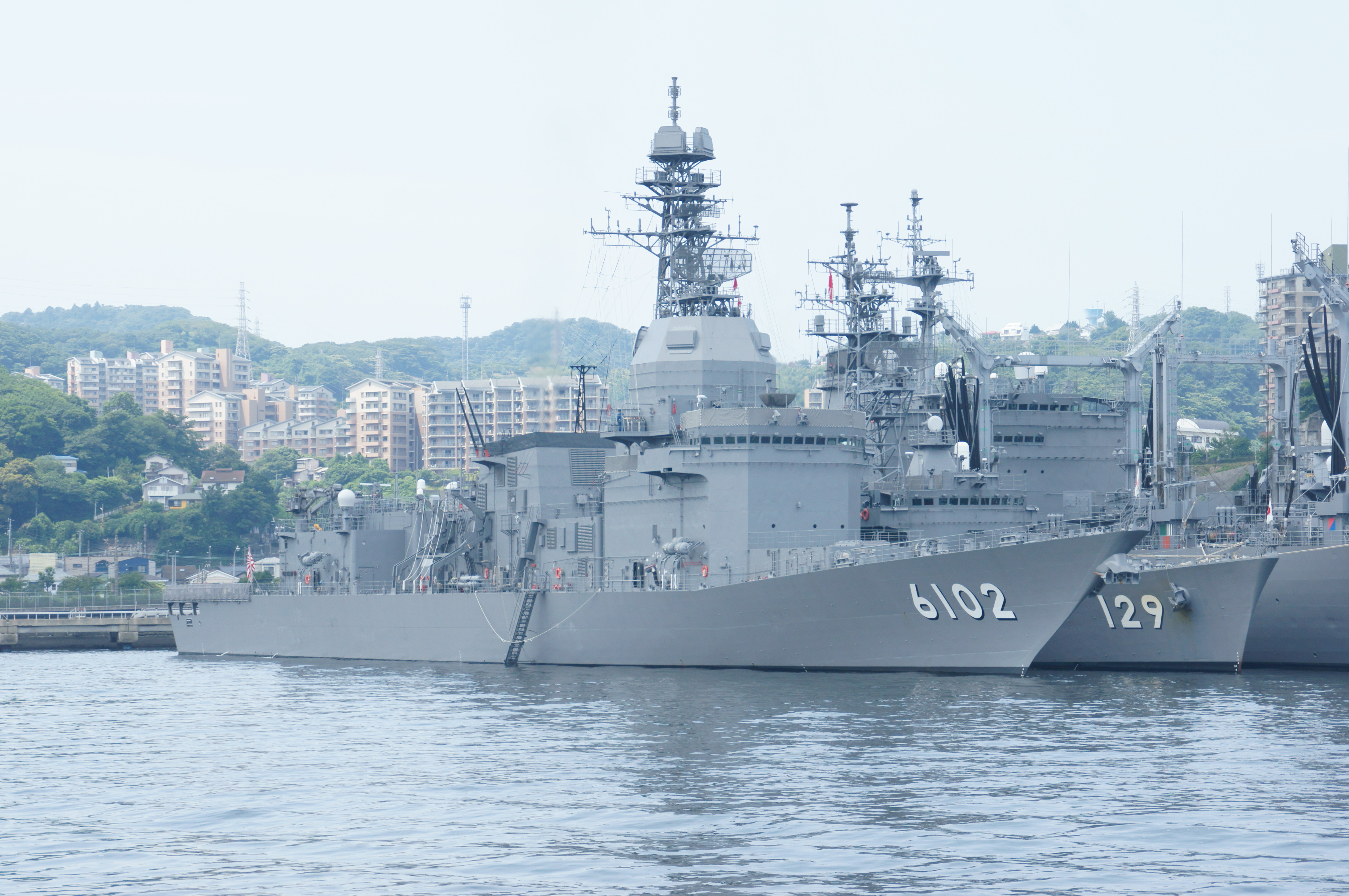 ASE-6102